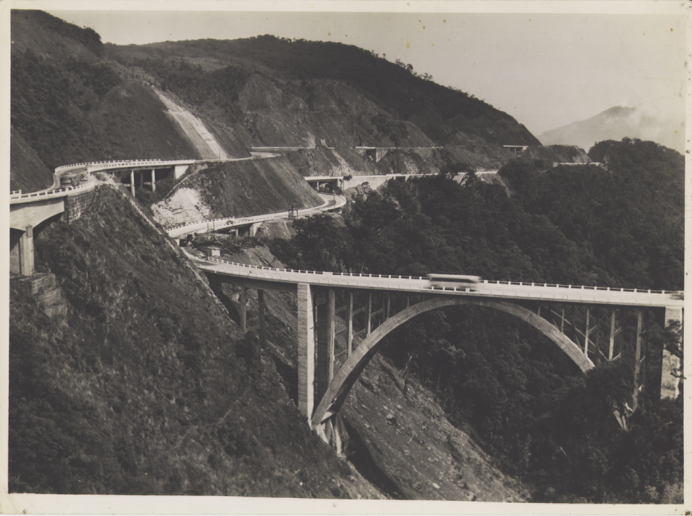 Obra que integra o acervo do Museu Paulista da USP. Coleção Werner Haberkorn